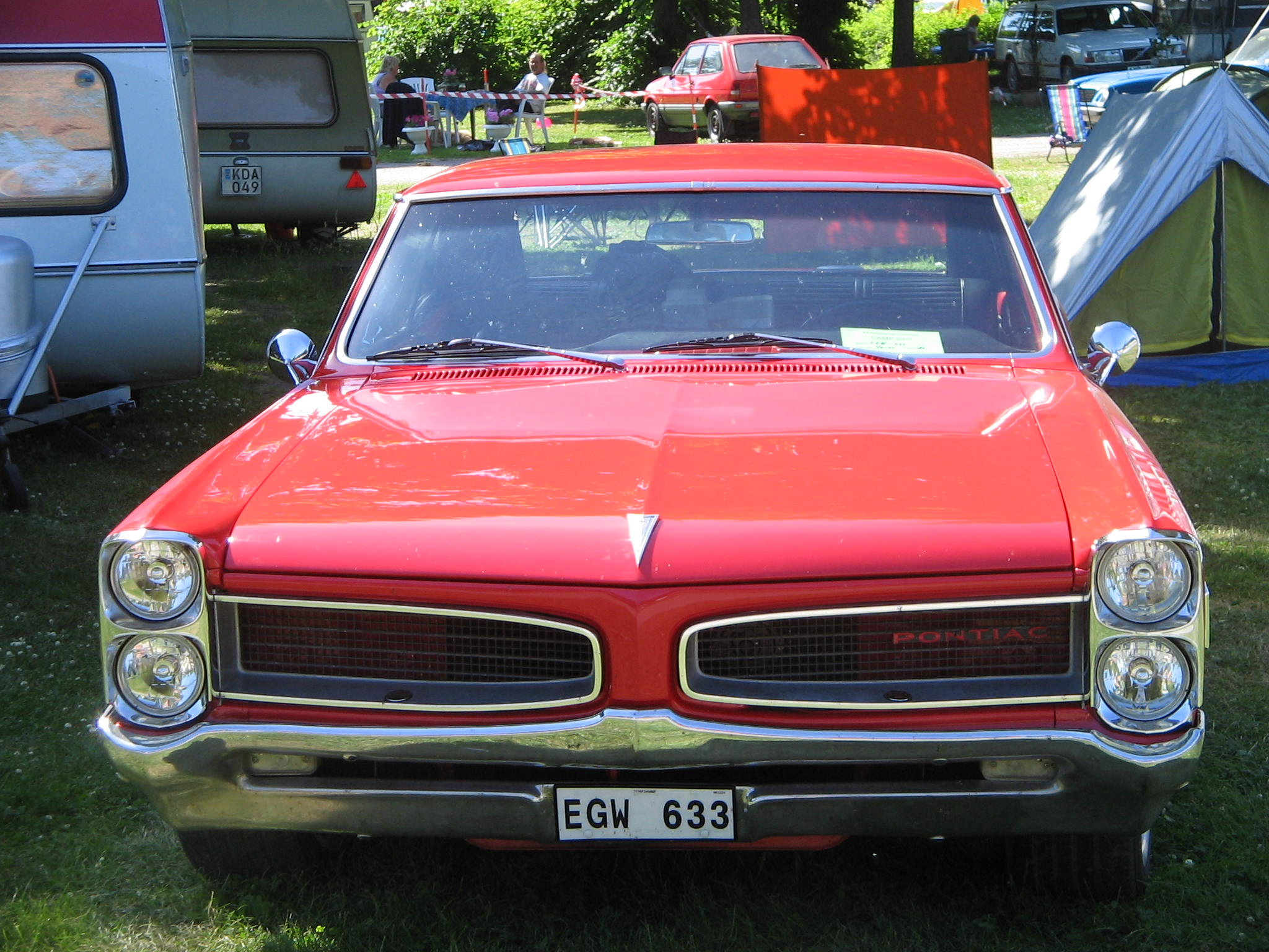 1966 Pontiac Tempest 23717.